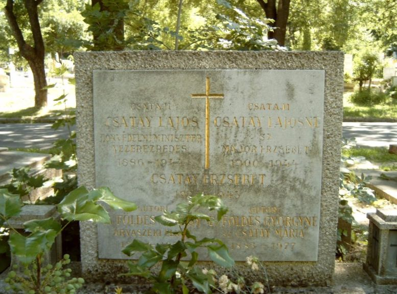 Csatay Lajos (Arad, 1886. augusztus 1. – 1944. október 16.) honvédelmi miniszter sírja Budapesten. Farkasréti temető: 8/3-1-153/154